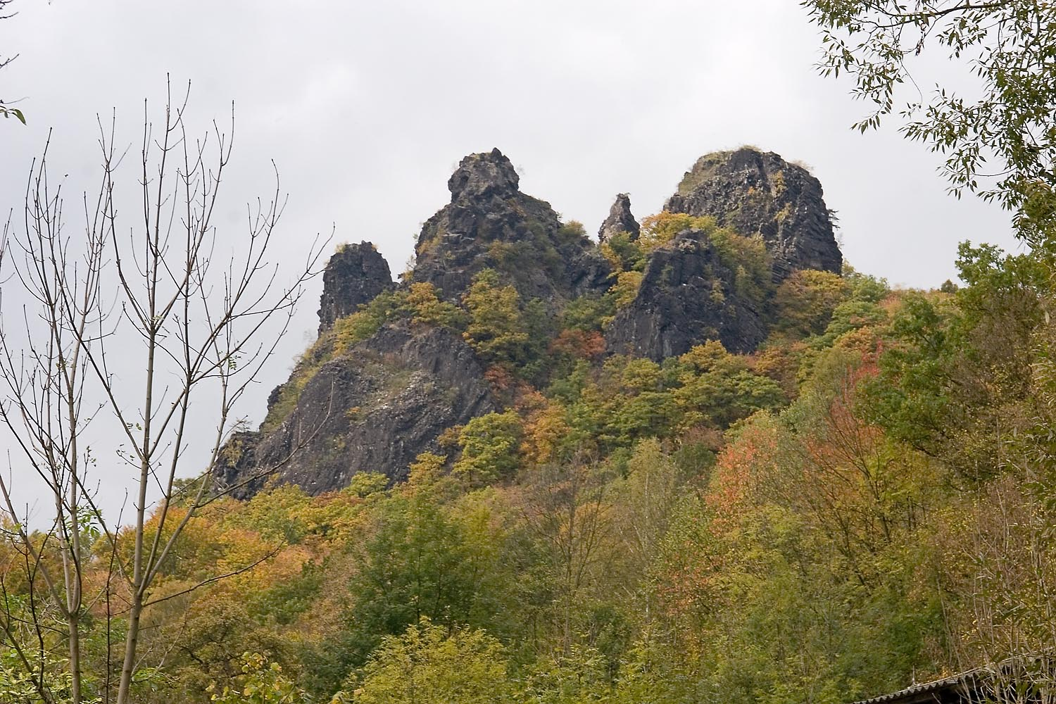 Vrabinec - pohled od Babětína